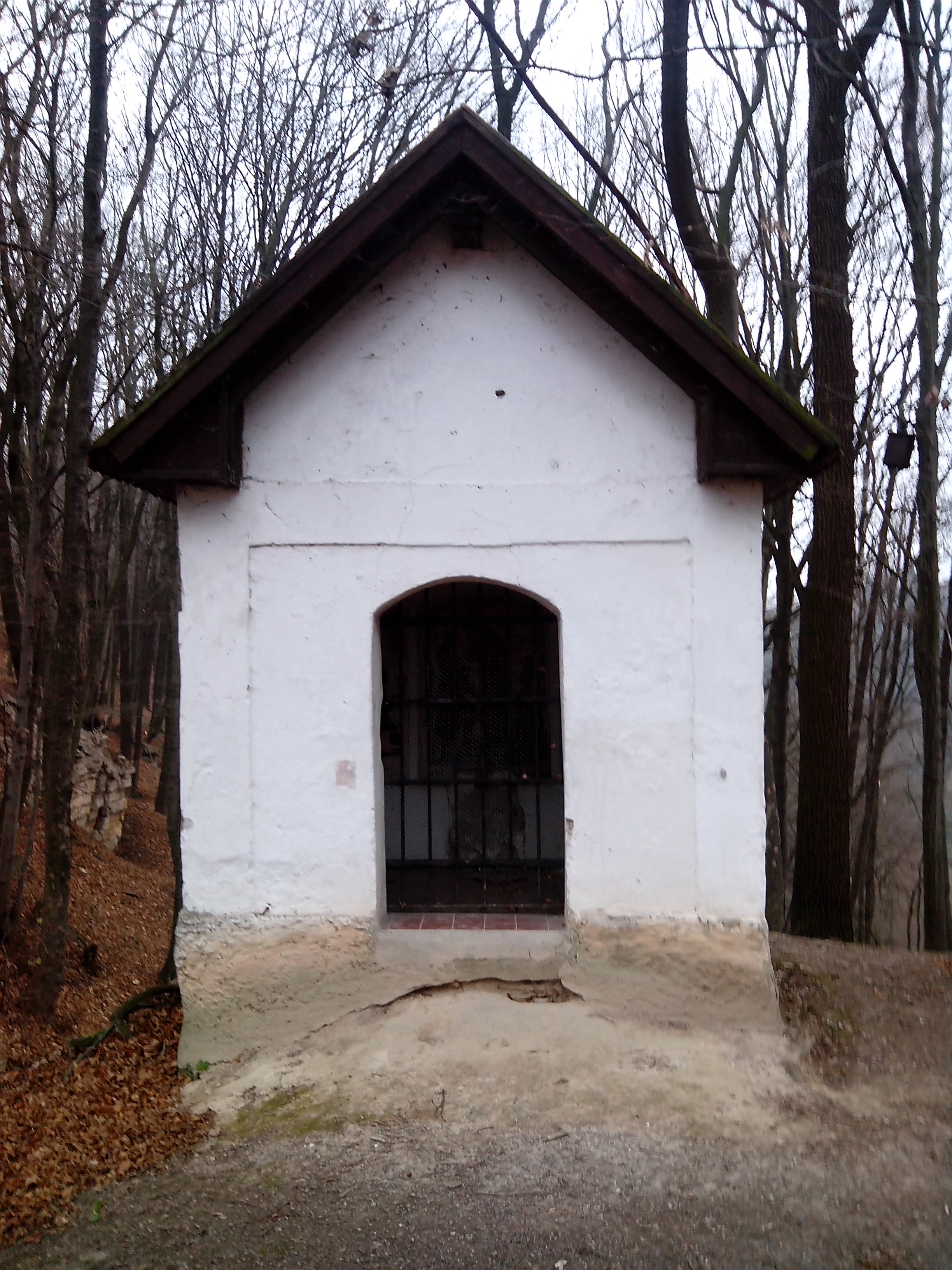 Kaple Čtrnácti svatých pomocníků (Nové Město nad Metují)